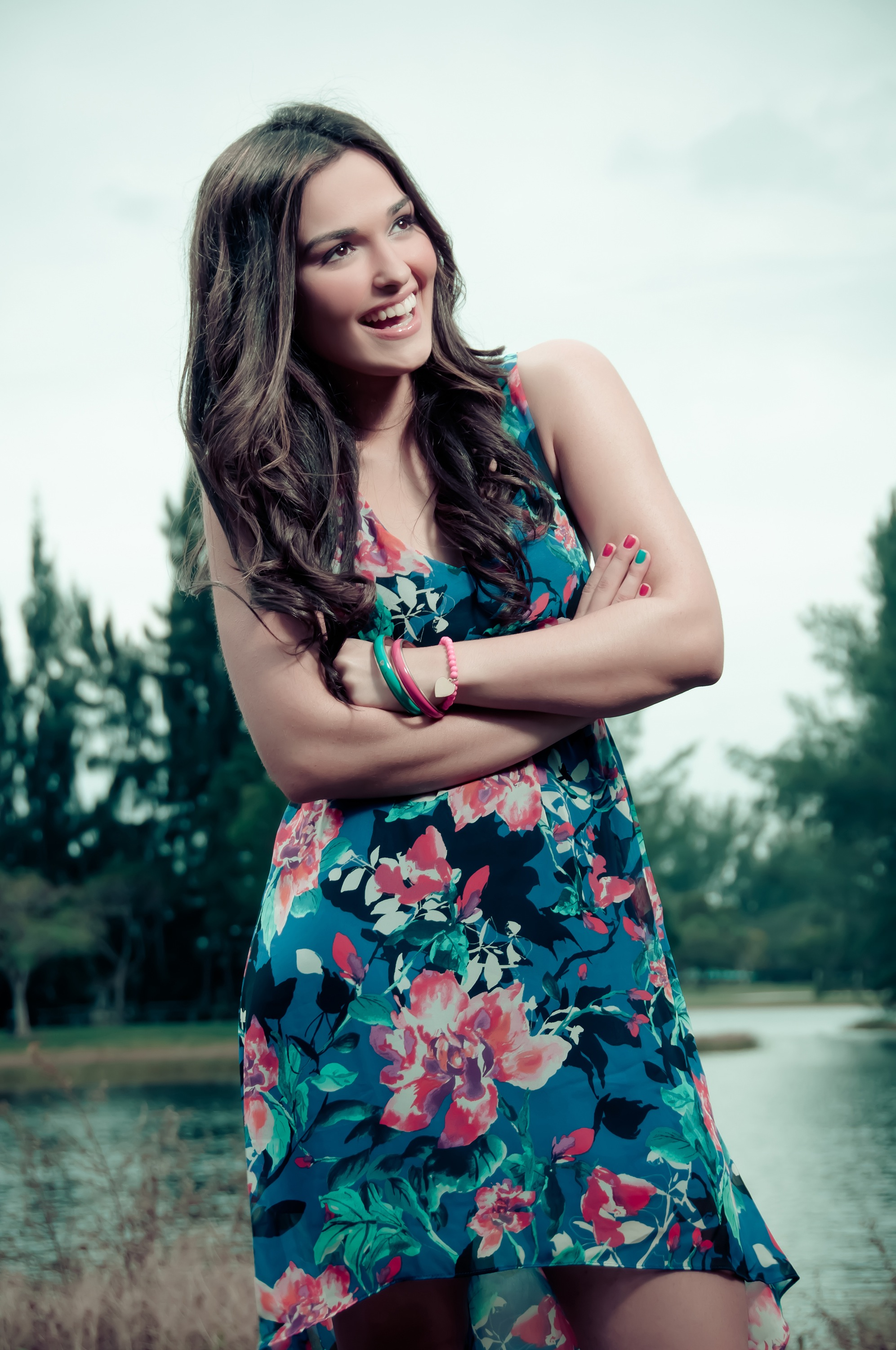 Estefany Oliveira de Sousa